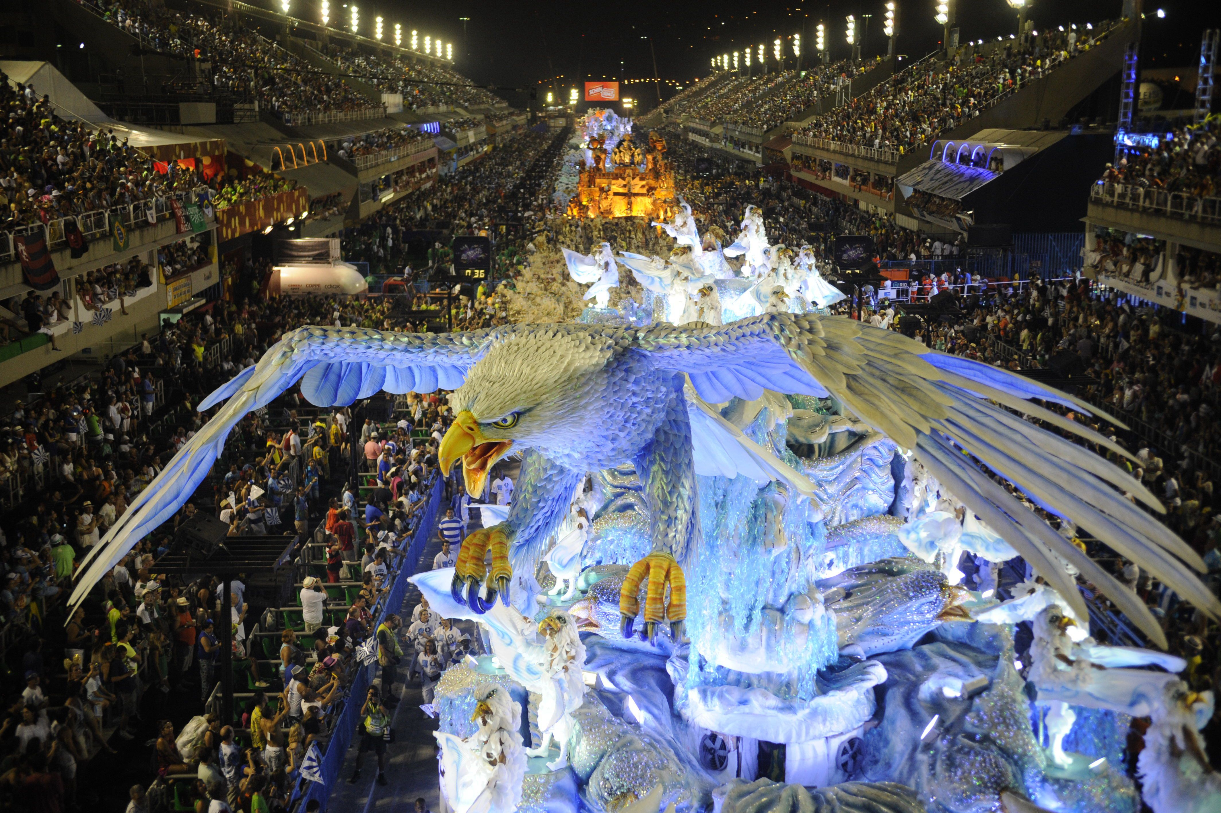 Rio de Janeiro - Escolas de samba do Grupo Especial se apresentam no Sambódromo da Marquês de Sapucaí, no segundo dia de desfiles (Fernando Frazão/Agência Brasil)